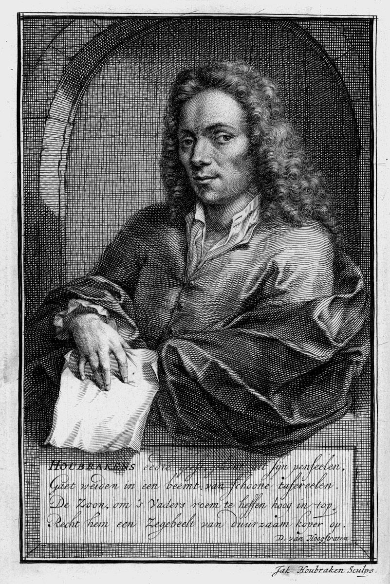 Portrait Arnold Houbraken, from: Arnold Houbraken: De groote schouburgh der Nederlantsche konstschilders en schilderessen. Den tweeden druk, Den Haag, J. Swart, C. Boucquet und M. Gaillard, 1753